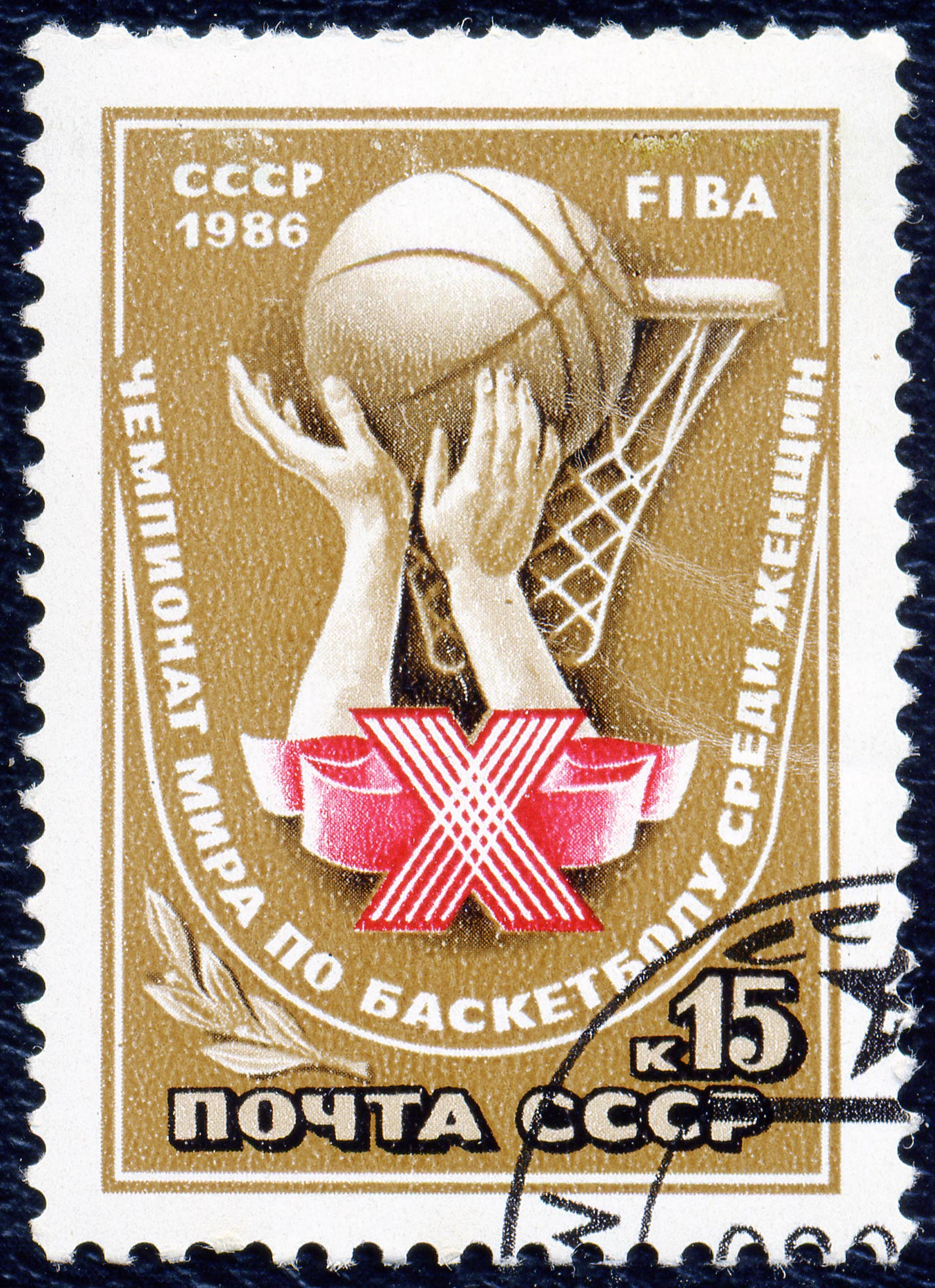 Почтовая марка СССР. 1986. Чемпионат мира по баскетболу среди женщин